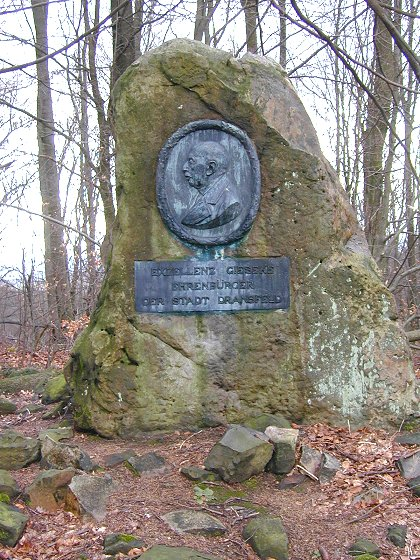 Exellenz Gieseke, Ehrenbürger der Stadt Dransfeld, Gedenkstein auf dem Hohen Hagen